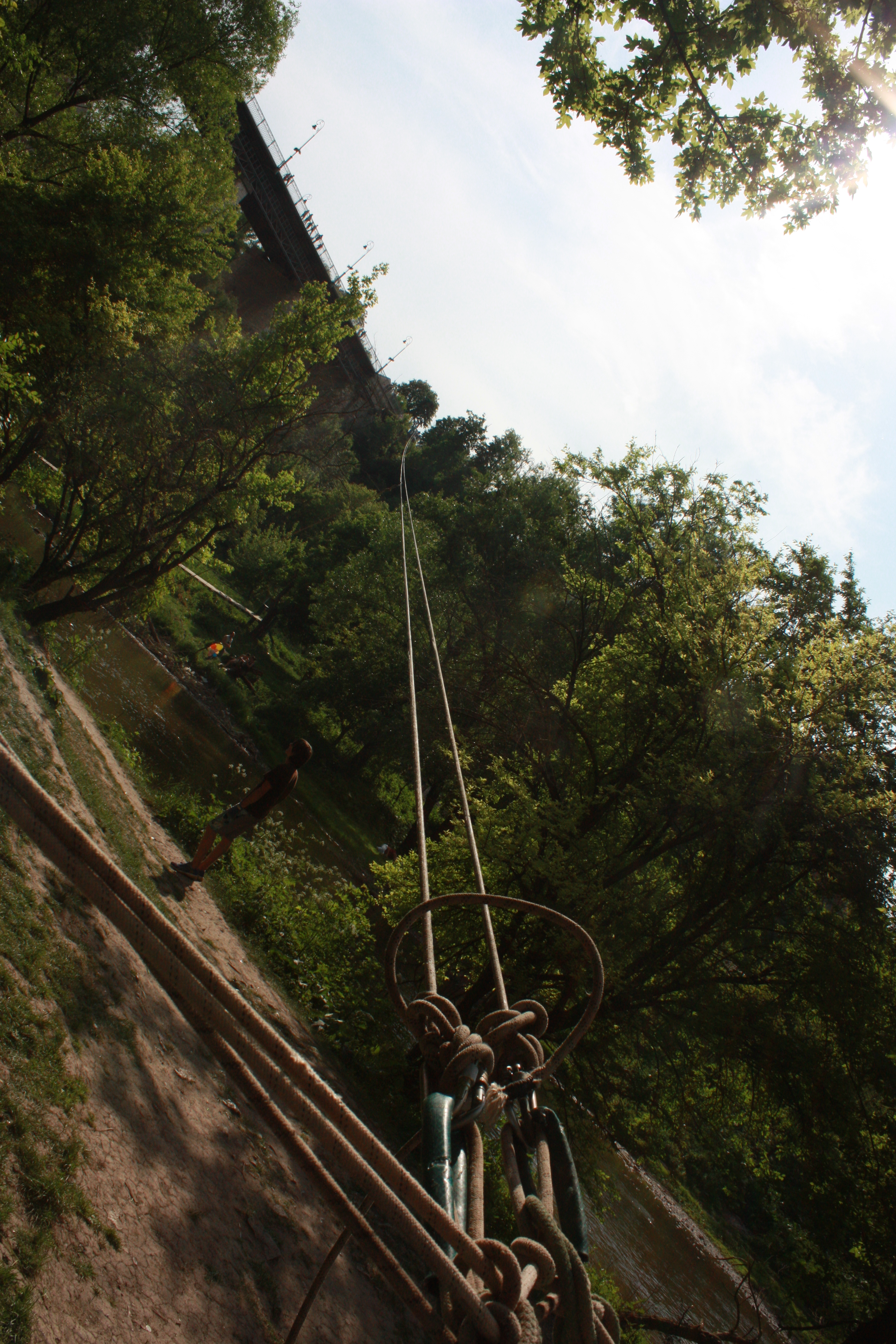 Смотрицький каньйон, Кам'янець-Подільський район, Від с. Голоскіу до с. Цибулівка